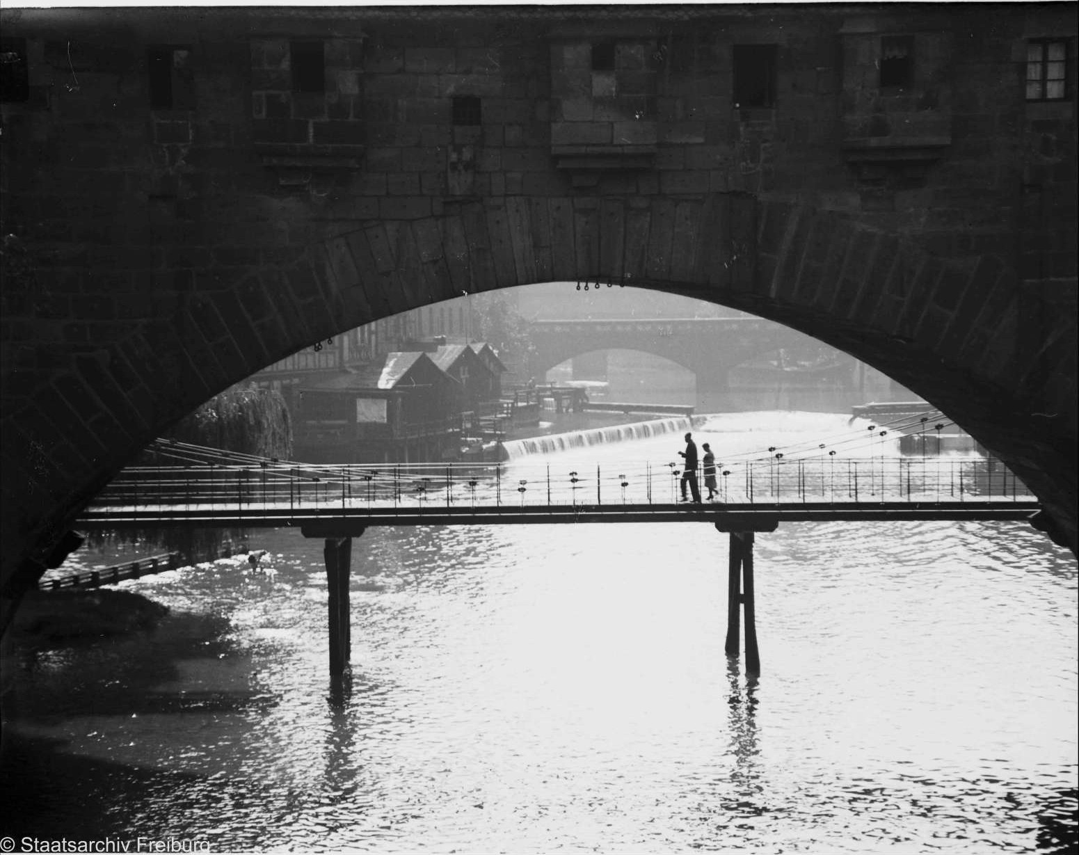 Nürnberg: Blick durch die Fronveste auf den Kettensteg.